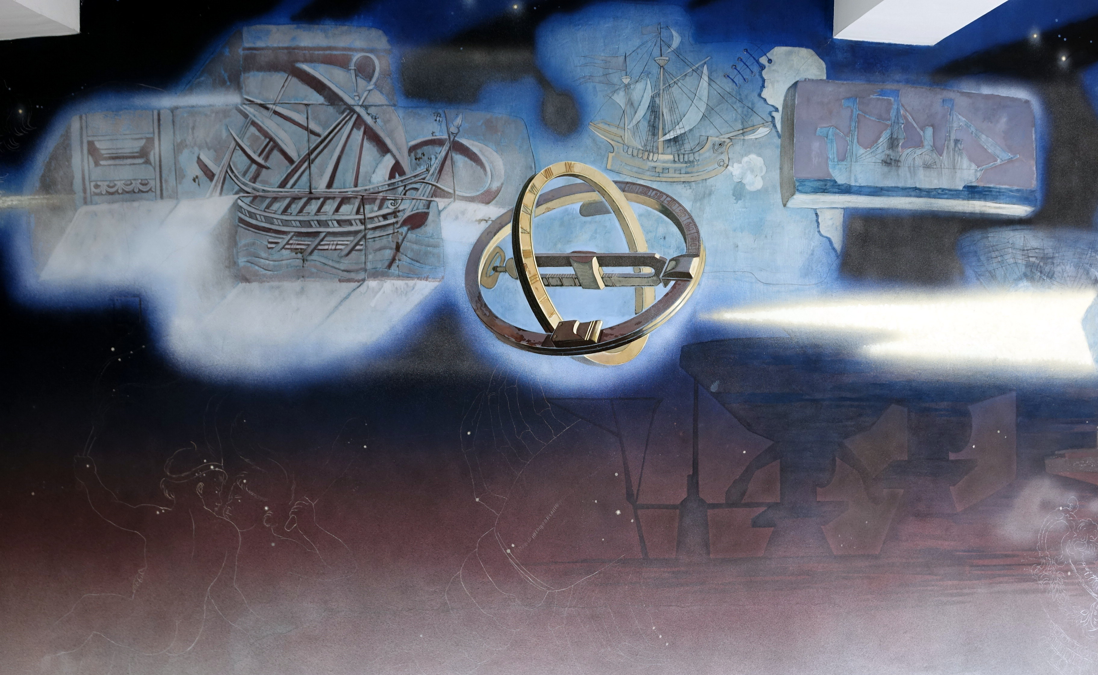 Планетариум ВВМУ Стенопис 2